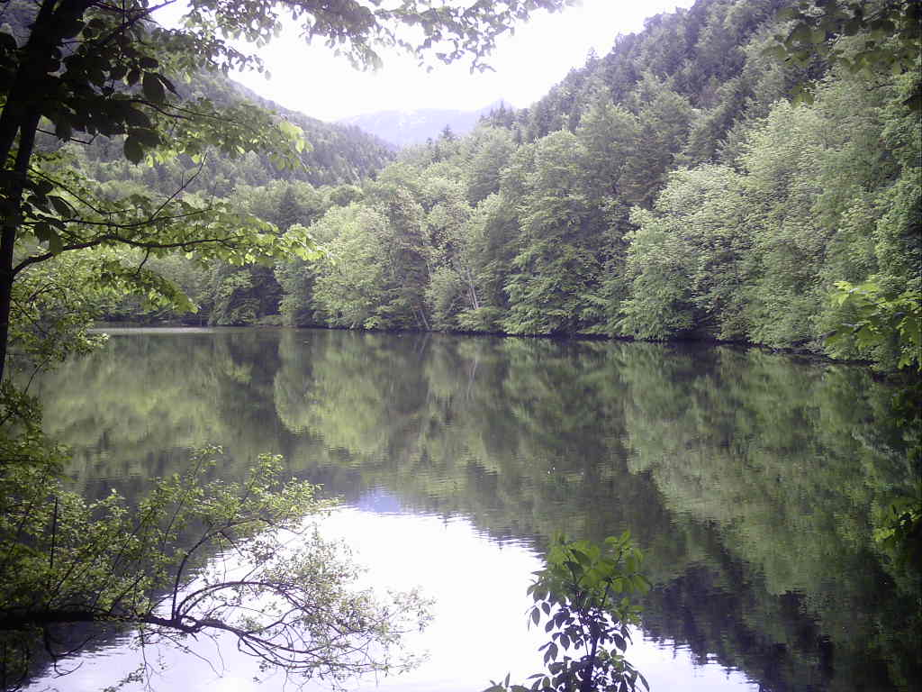 Schlossweiher Lenggries